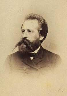 Photo